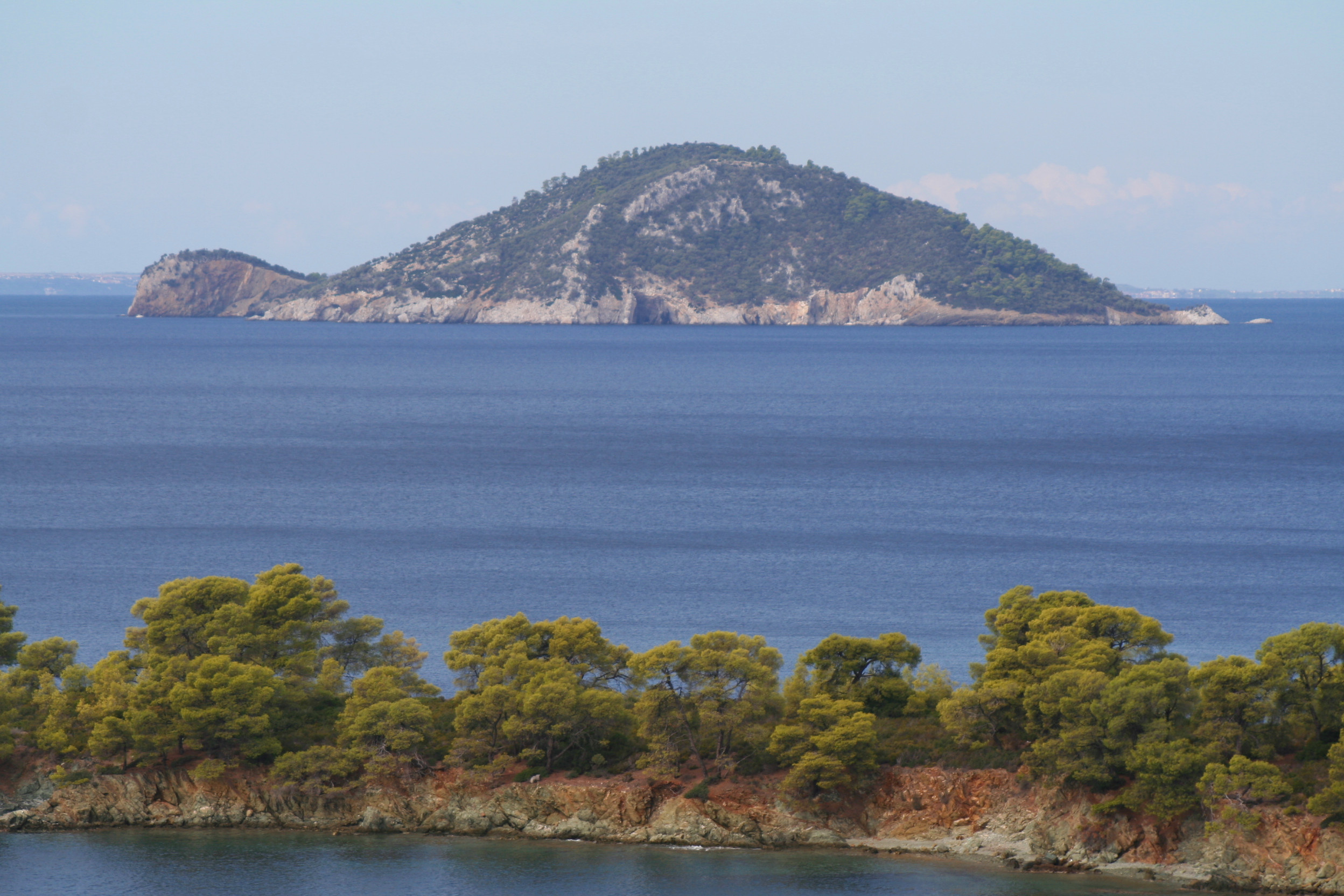 Die Insel Kelifos, wegen ihrer charakteristischen Form auch "Schildkröte" genannt.